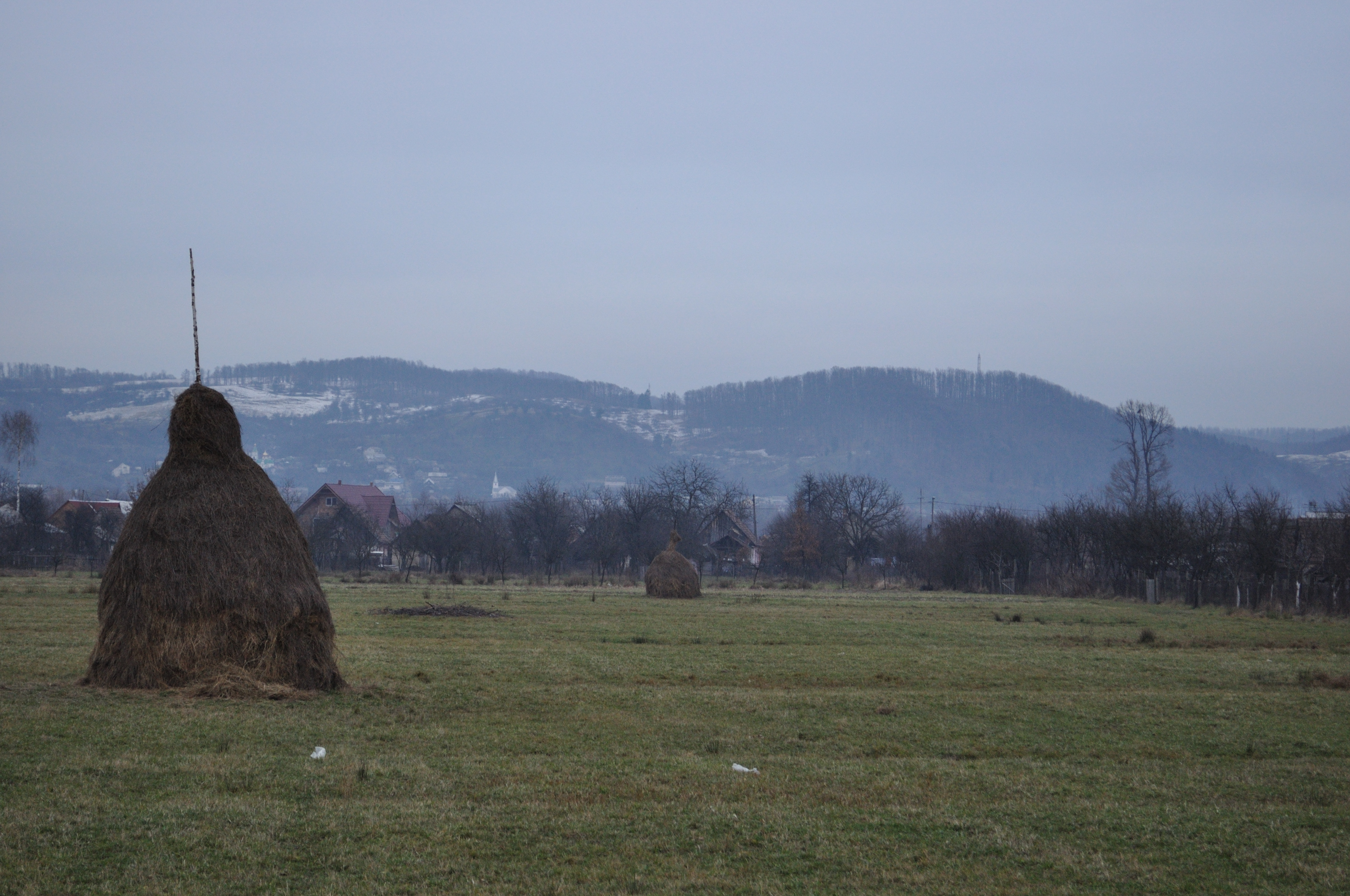 Câmpulung la Tisa, județul Maramureș